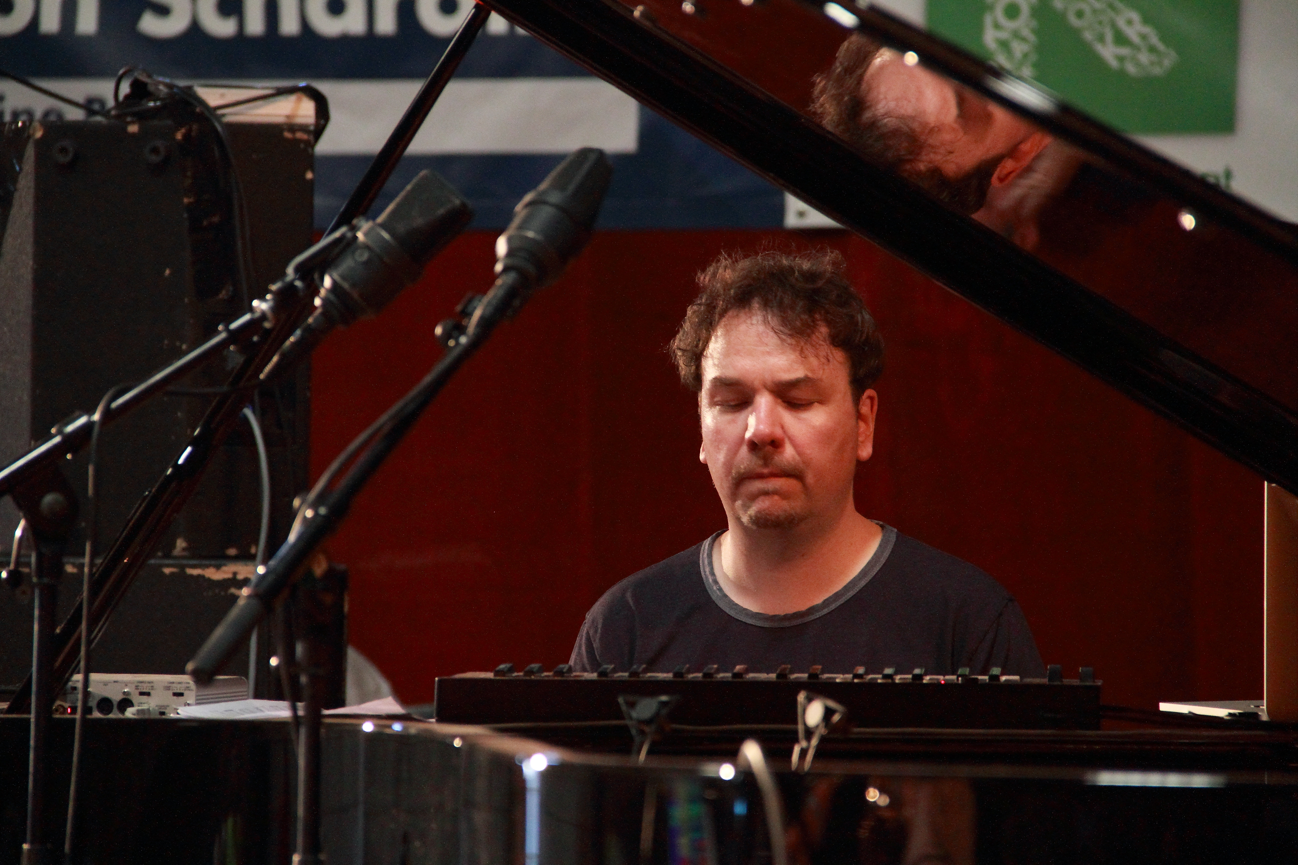 Markus Stockhausen und Florian Weber mit ihrem Projekt INSIDE OUT auf dem INNtöne Jazzfestival 2017.